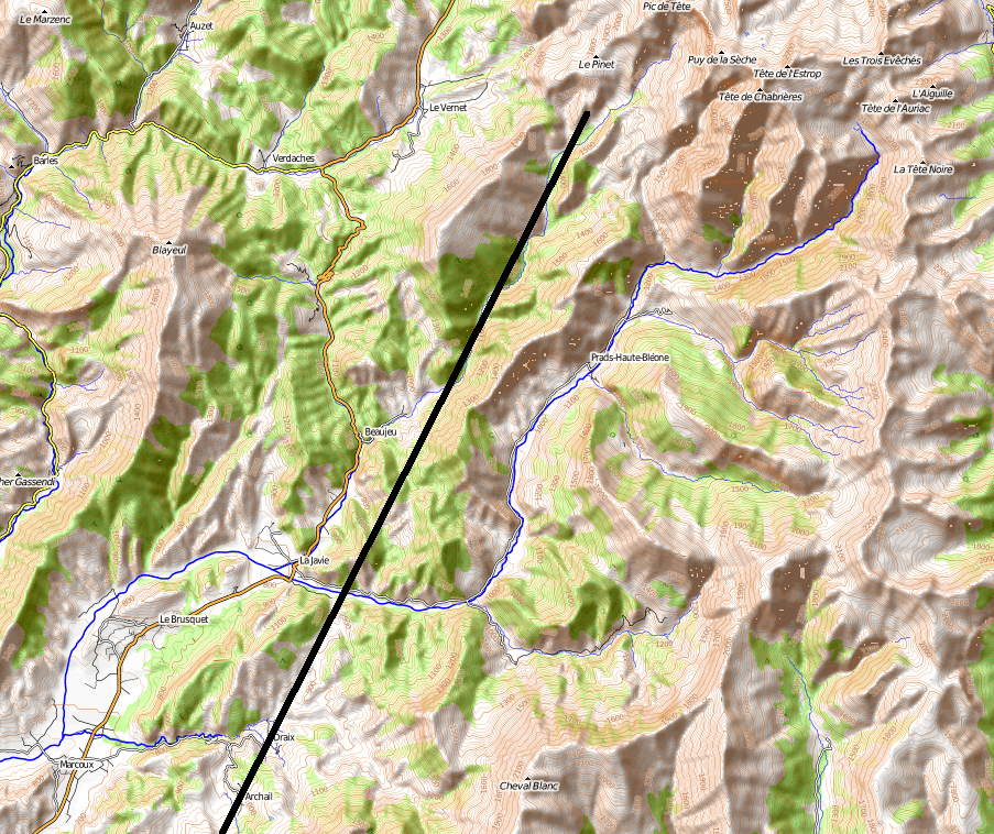 Flugroute bis zur Absturzstelle von Germanwings-Flug 9525 mit Topografie